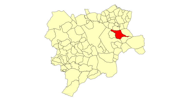 Mapa municipal de Albacete con el municipio de Higueruela resaltado en rojo.